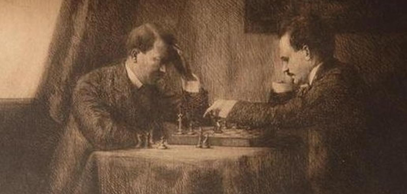 Löwenstamm Emma - Adolf Hitler hraje šachy s Leninem